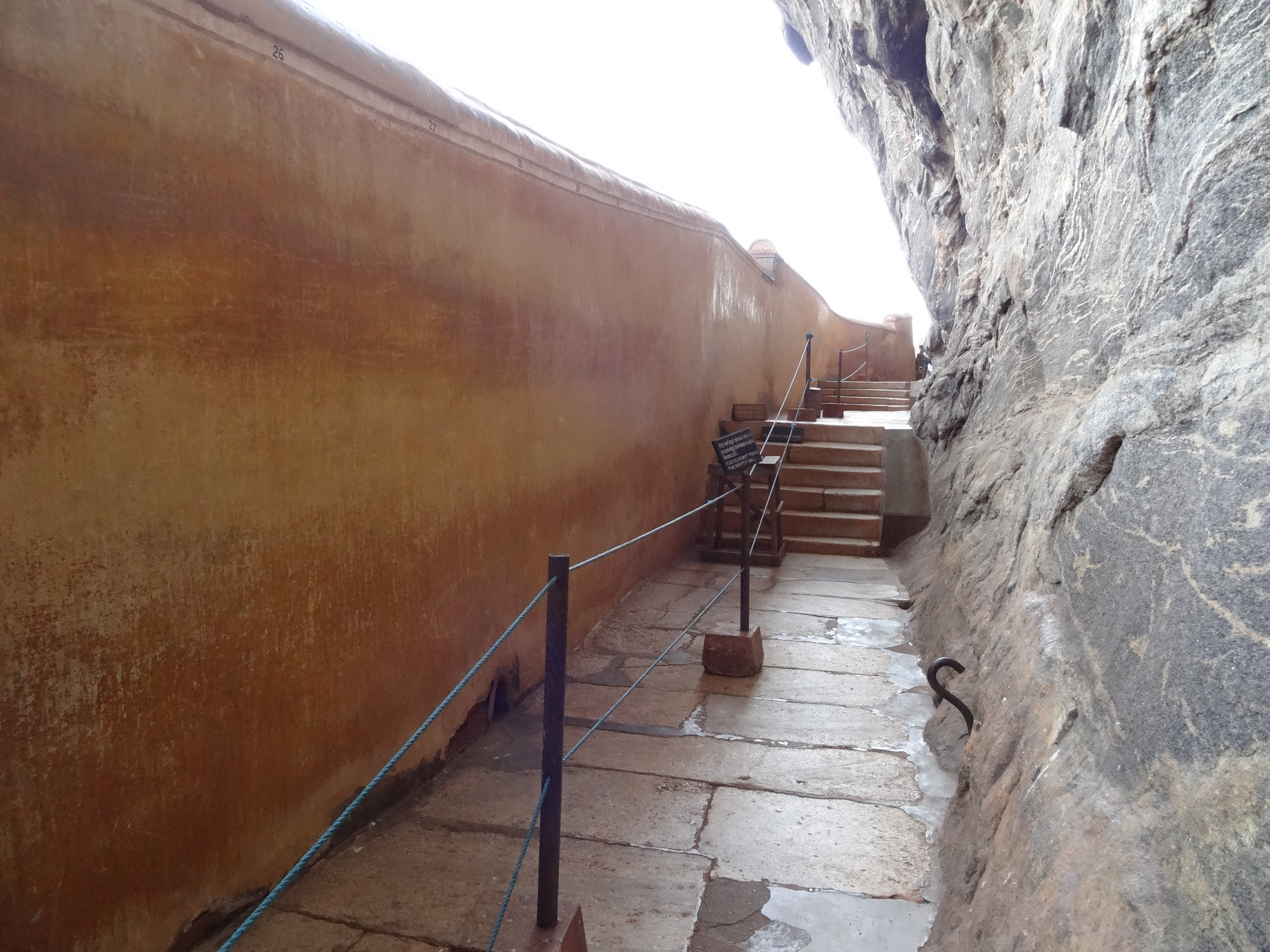 Sigiriya mirror wall